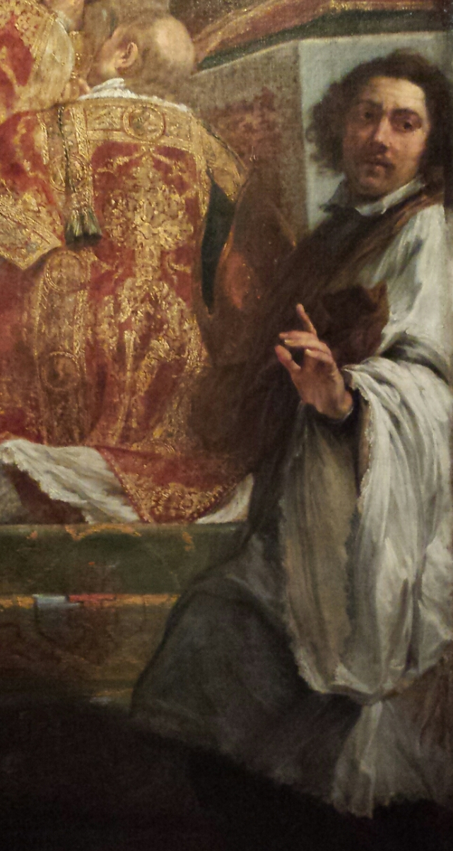 Detail von "Die Messe des heiligen Martinus", undatiert (um 1654), unsigniert, im Stadtmuseum Münster, dort im Bildtext: Der Maler hat sich mit dem Kleriker am rechten Bildrand vermutlich selbst porträtiert."